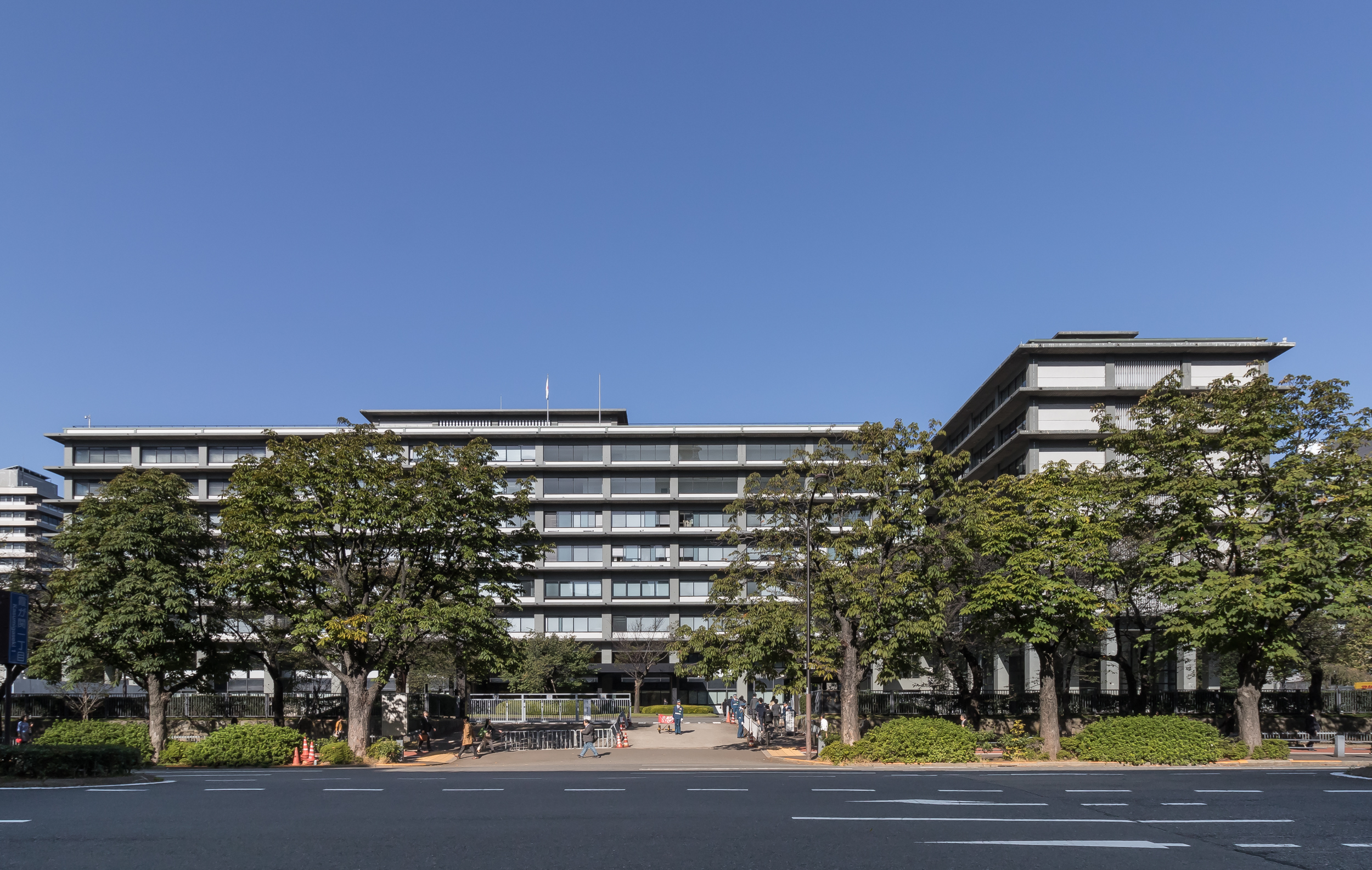 外務省、東京都千代田区霞が関。小坂秀雄設計